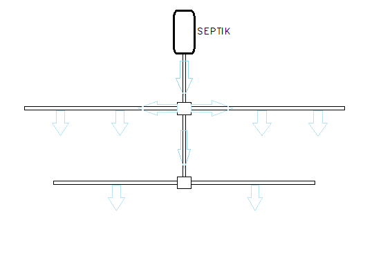 Imbväljaku süsteem - kaevik